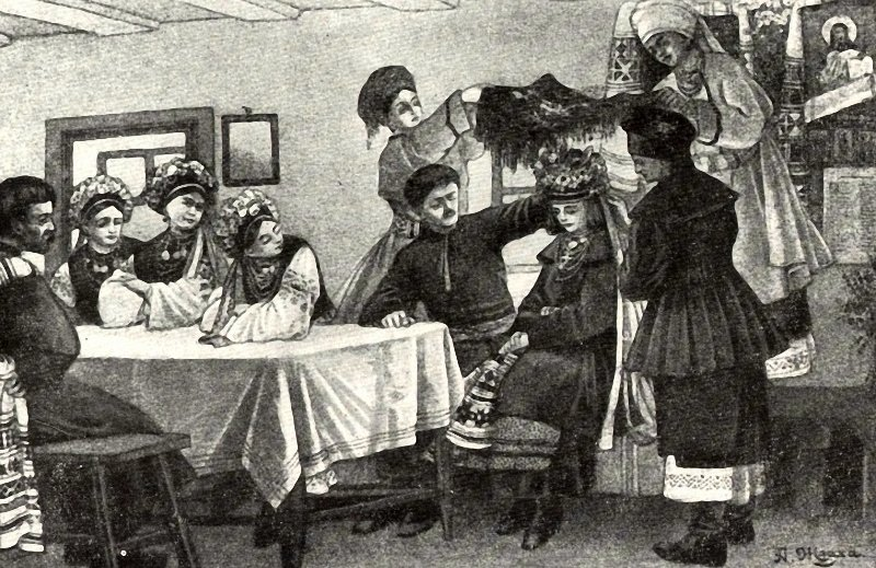 label QS:Luk,"Молоду покривають" Обряд покривання молодої хусткою. Східне Поділля